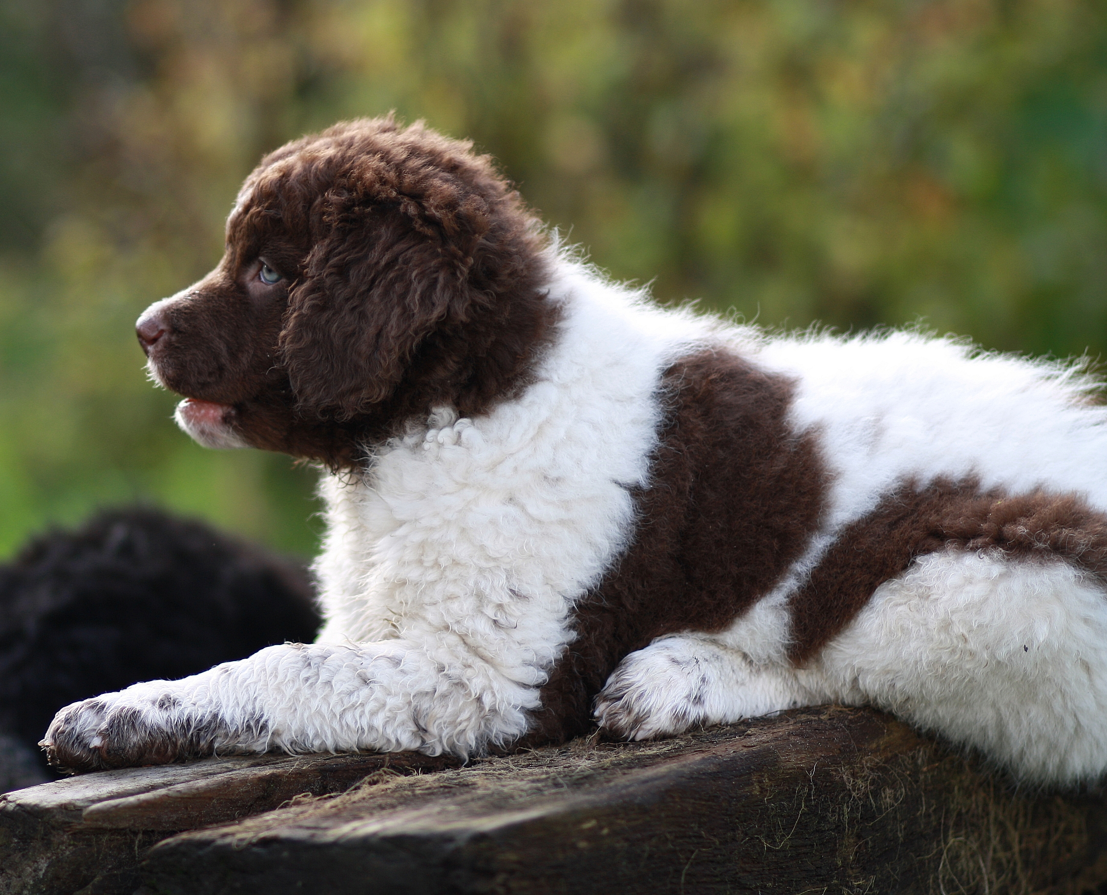 Iso fan de Frije Wetters